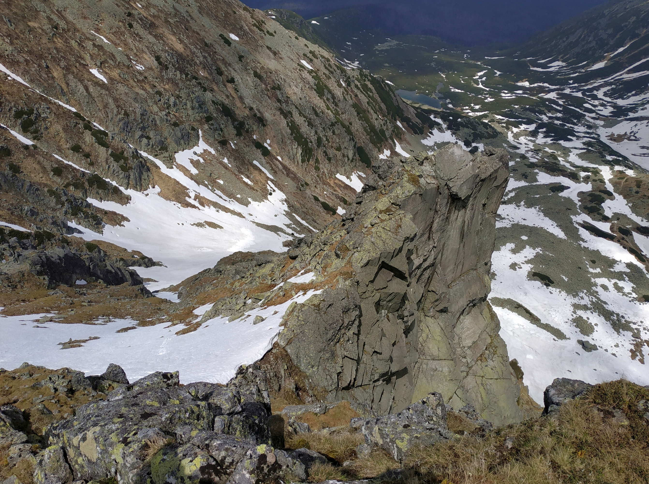 Pańszczycka Turnia